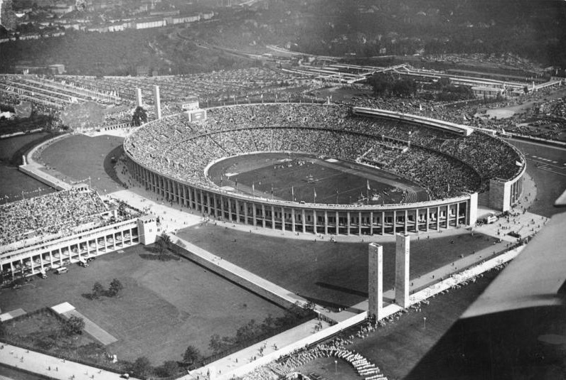 Berlin, Olympia-Stadion (Luftaufnahme) Das Olympia-Stadion in Berlin